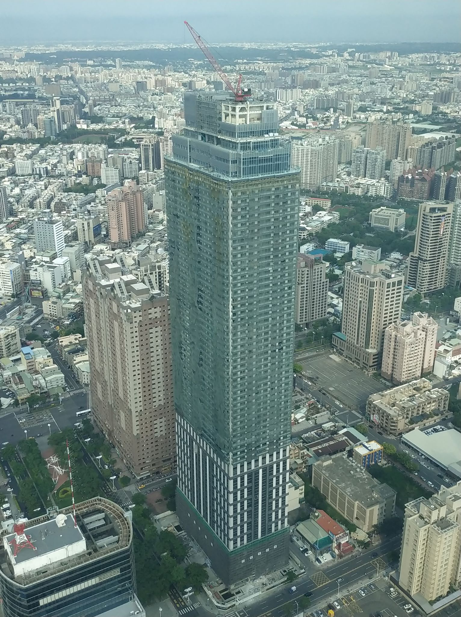 遠雄The One，2019年5月11日在85大樓觀景台拍攝